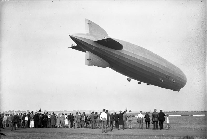 Der jubelnde Empfang des "Graf Zelppelin" auf dem Luftschiffhafen in Berlin-Staaken! Der "Graf Zeppelin" bei seiner Ankunft auf dem Luftschiffhafen in Berlin-Staaken.